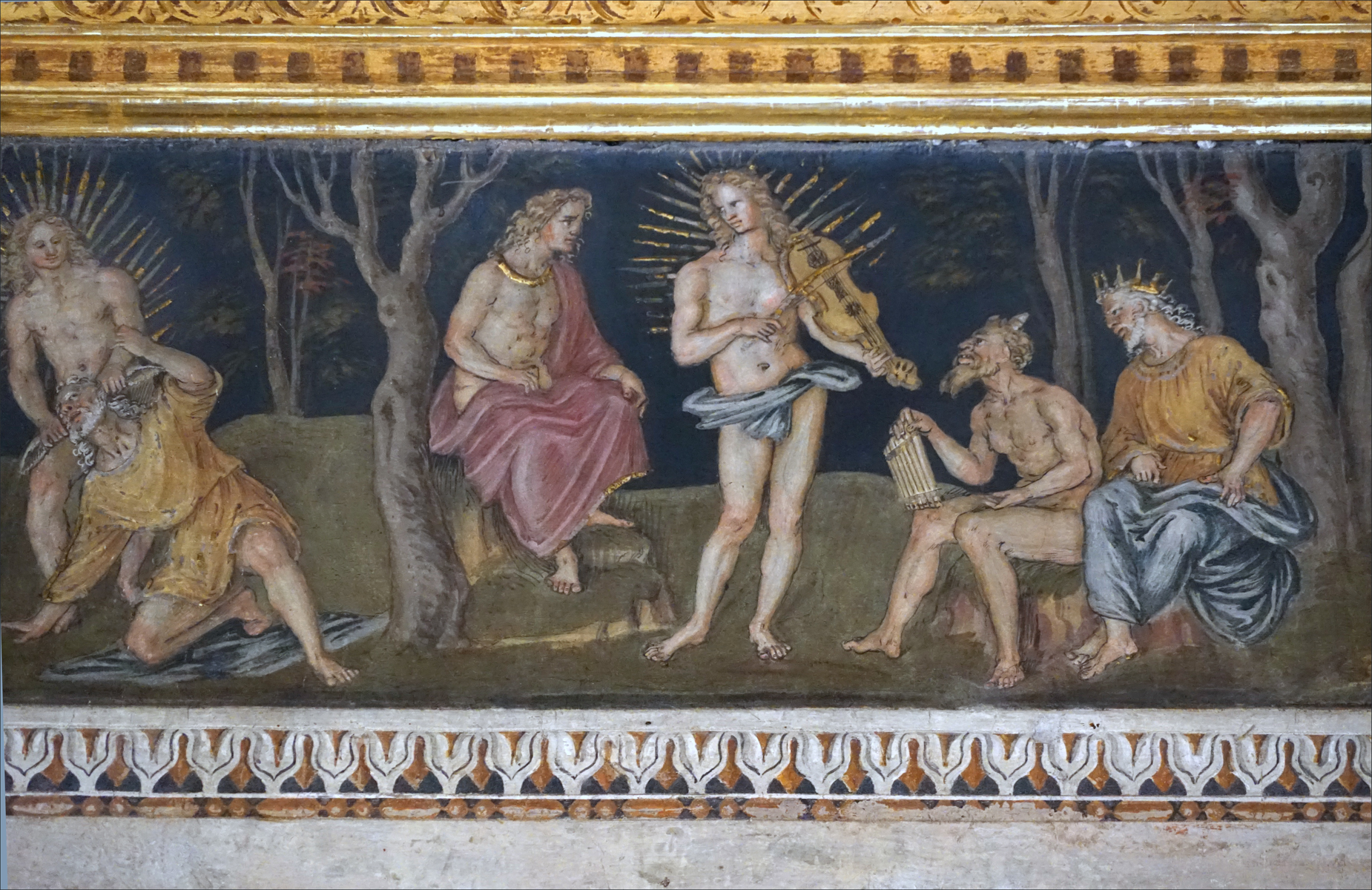 Le concours de musique entre Apollon jouant de la lyre et Pan jouant de la flûte qui porte son nom Le roi Midas, juge du concours, ayant choisi Pan au lieu d'Apollon, ce dernier lui a fait pousser des oreilles d'âne (image de gauche) La salle de la frise servait d'antichambre pour celle d'Agostino Chigi, le premier propriétaire de la villa. Elle doit son nom à la frise, peinte à fresque, en 1508 par Baldassarre Peduzzi et qui représente des scènes mythologiques. Site officiel de la villa Farnesina (Rome)